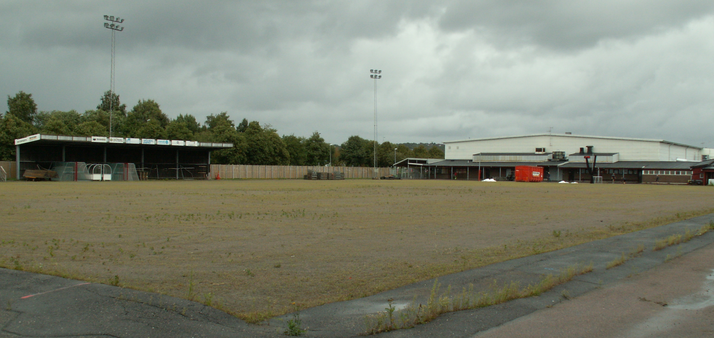 Mölndal Bandys vid fototillfället (1 september) ospolade bandyplan.